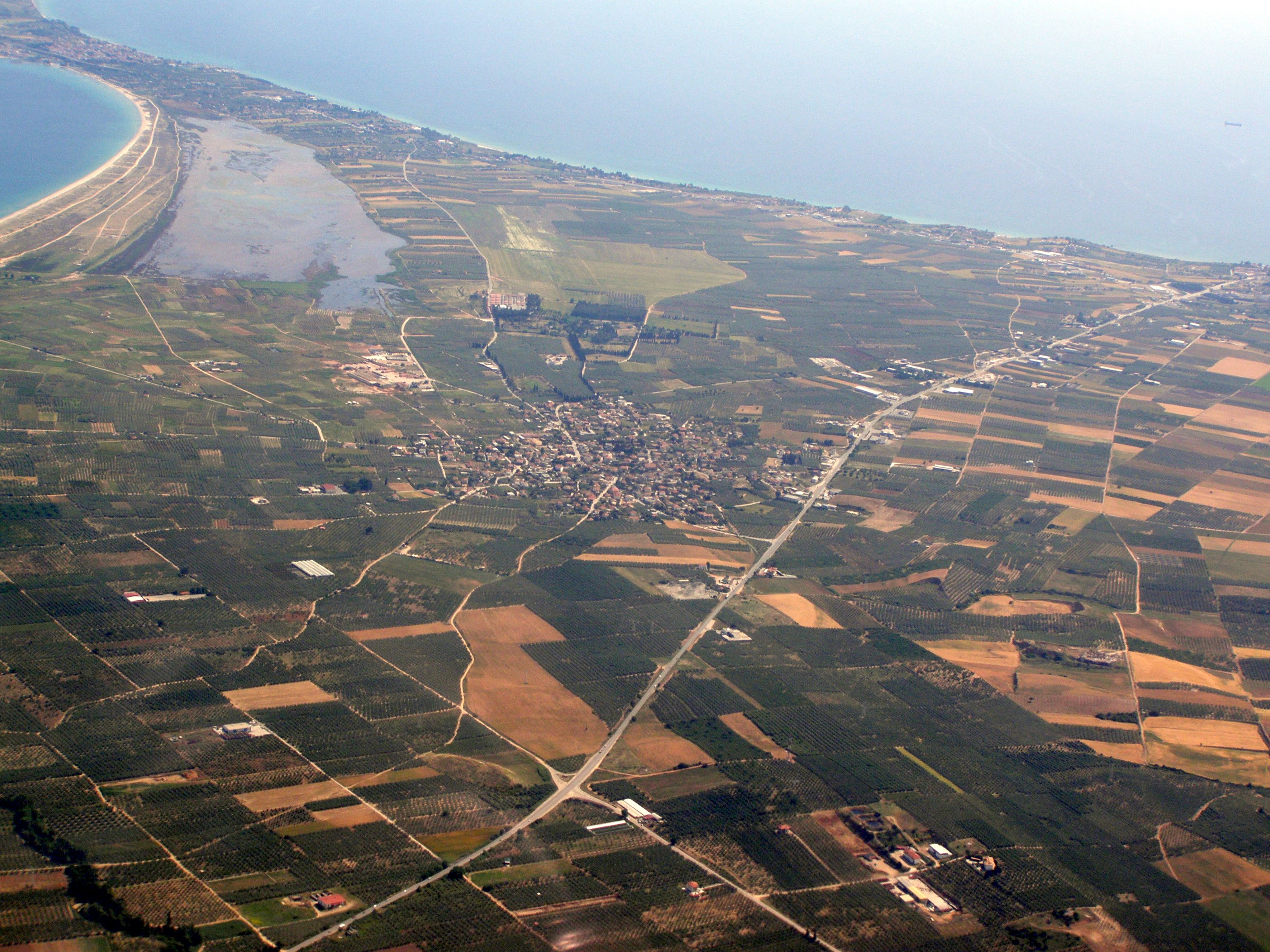 Αεροφωτογραφία Άγιου Μάμα Χαλκιδικής